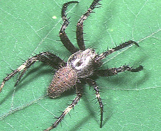 male Neoscona scylla from Okinawa.